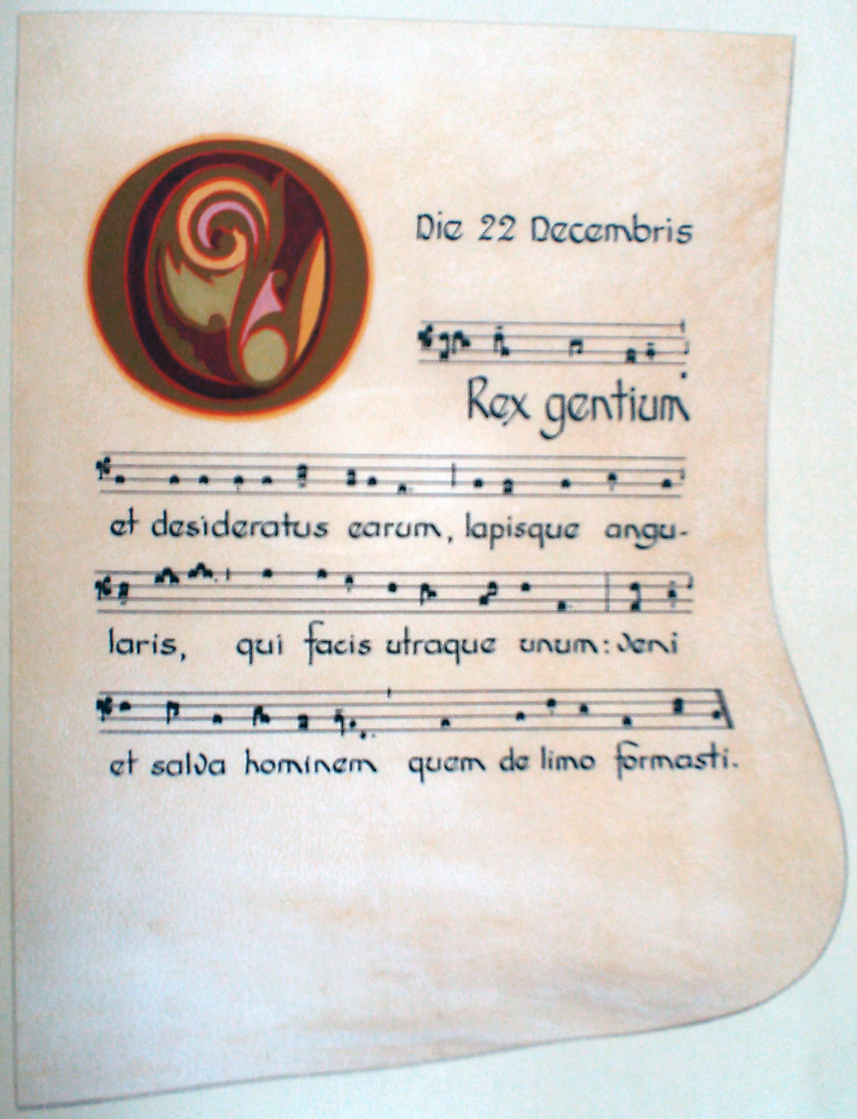 Foto da página do liber usualis da antifona do ó